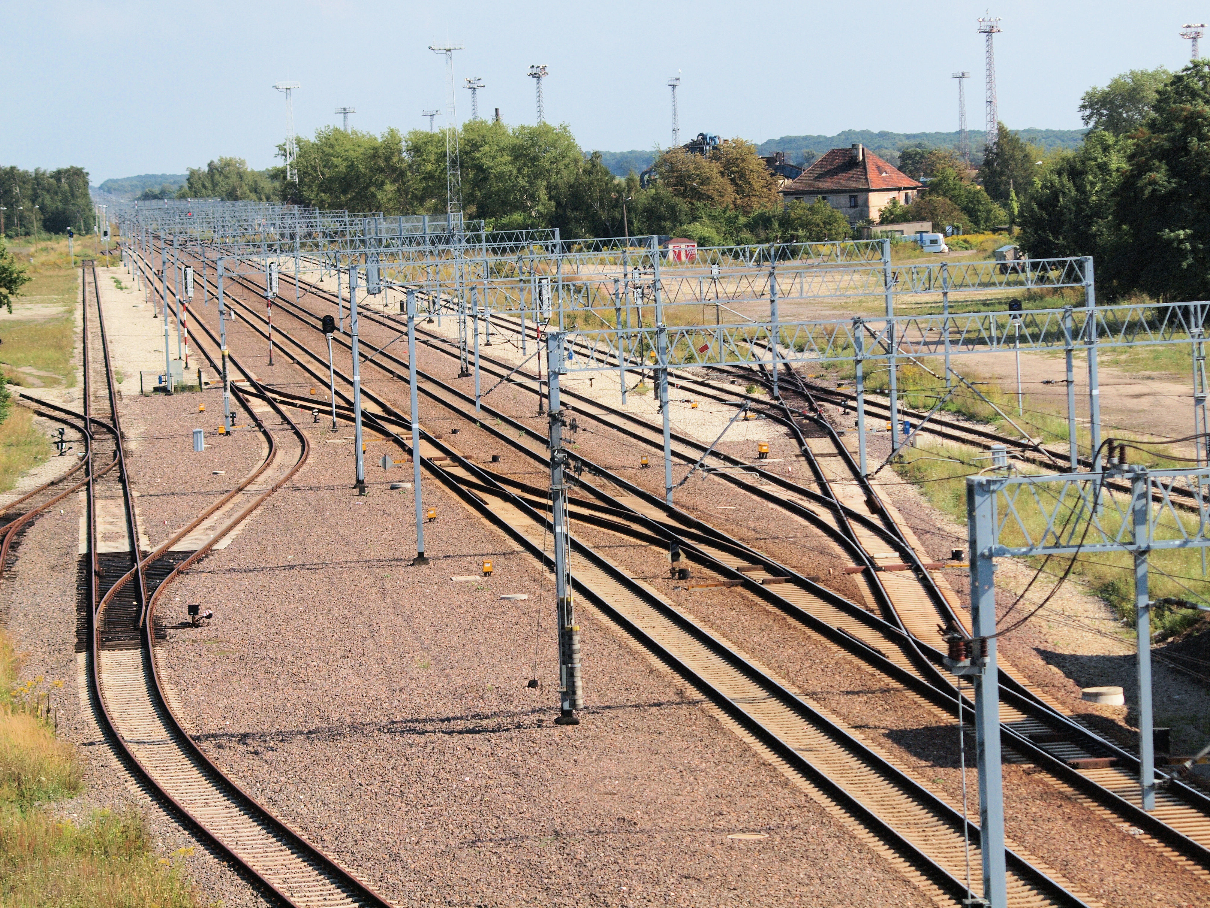 Układ torowy stacji Oława